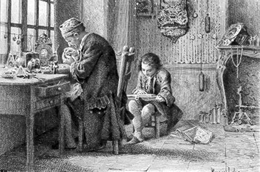 Illustration des Confessions, édition H. Launette & Cie, Paris, 1889